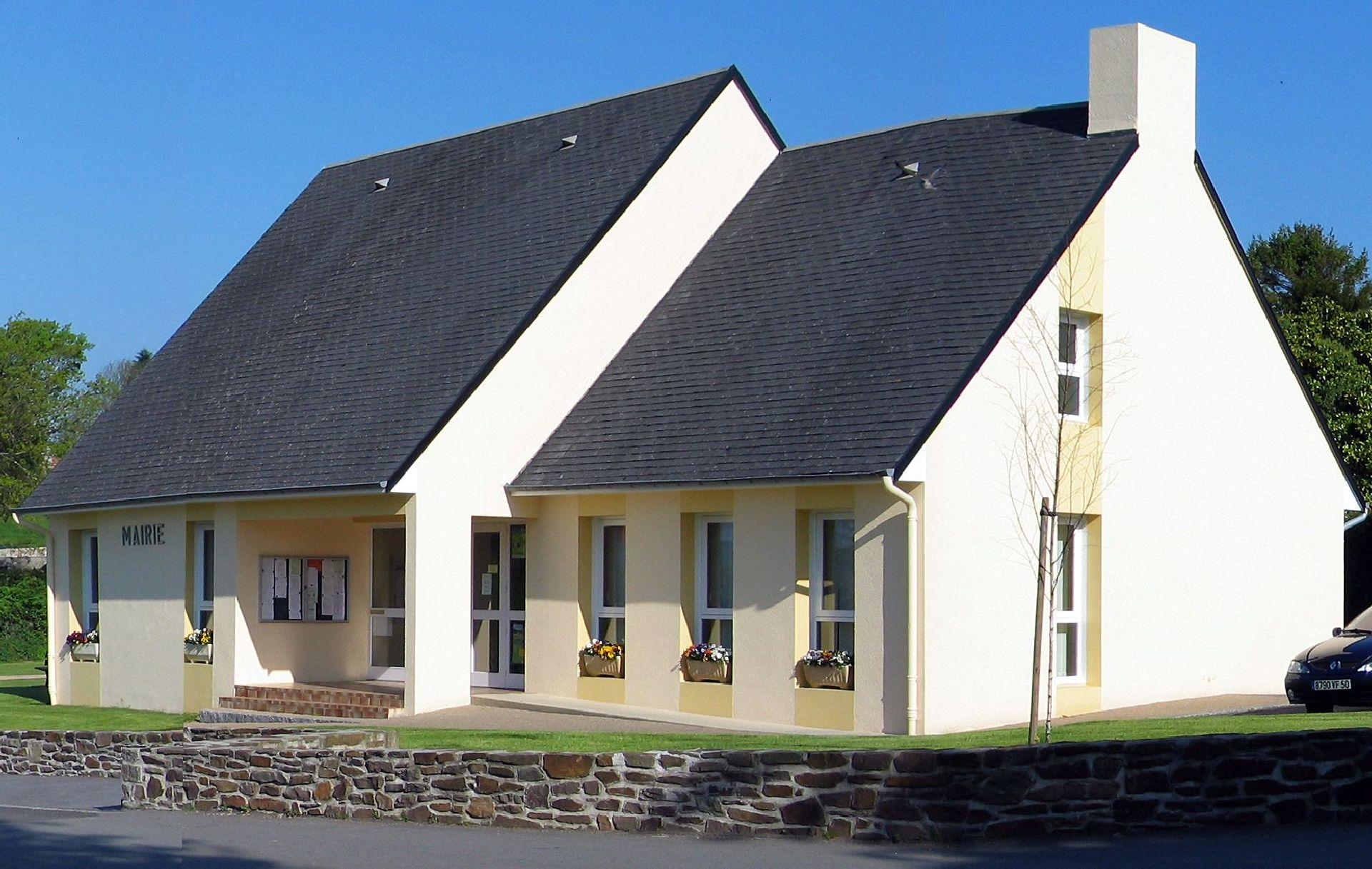 Mairie de Teurtheville-Hague